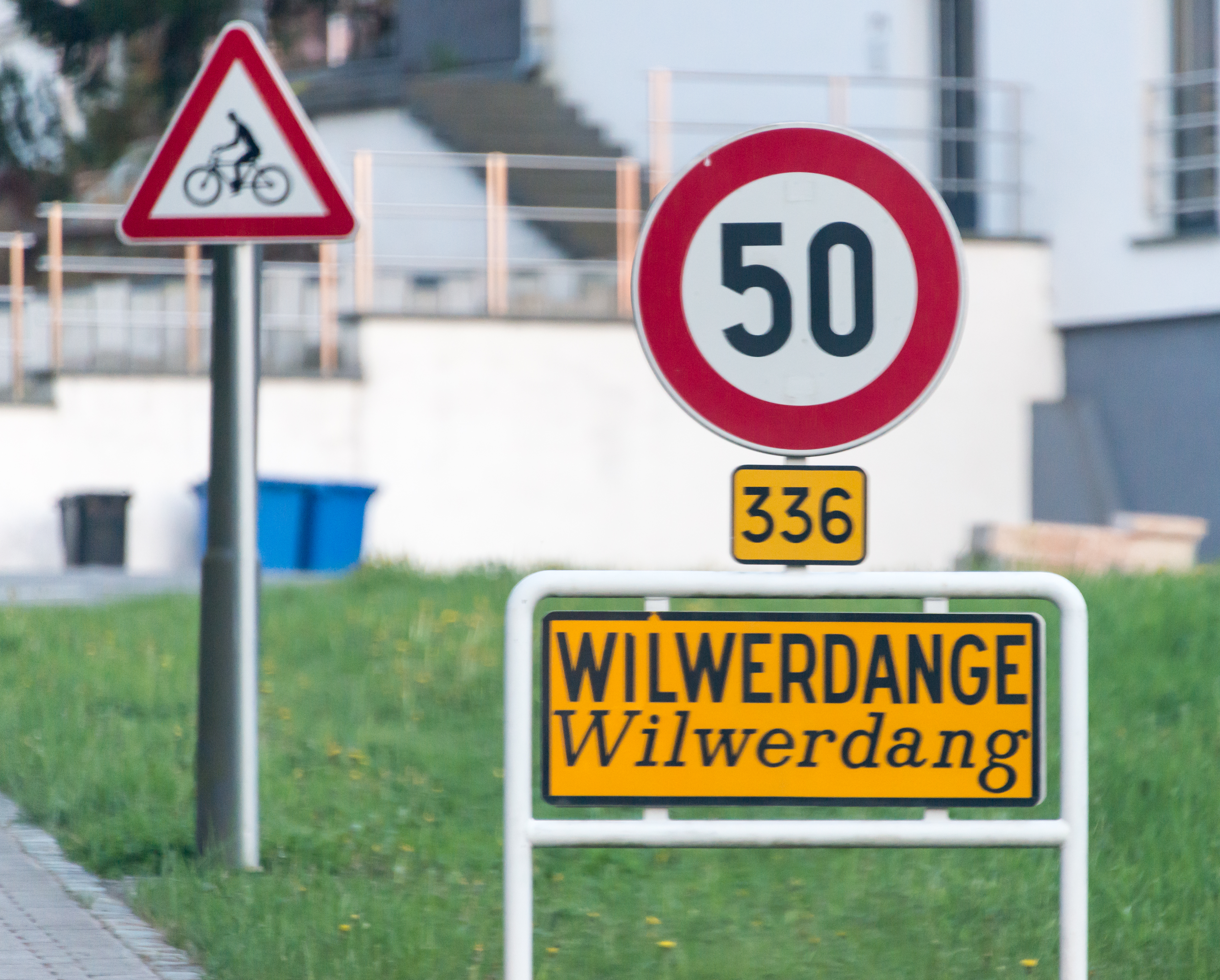 Uertschaftsschëld um CR336 zu Wilwerdang.